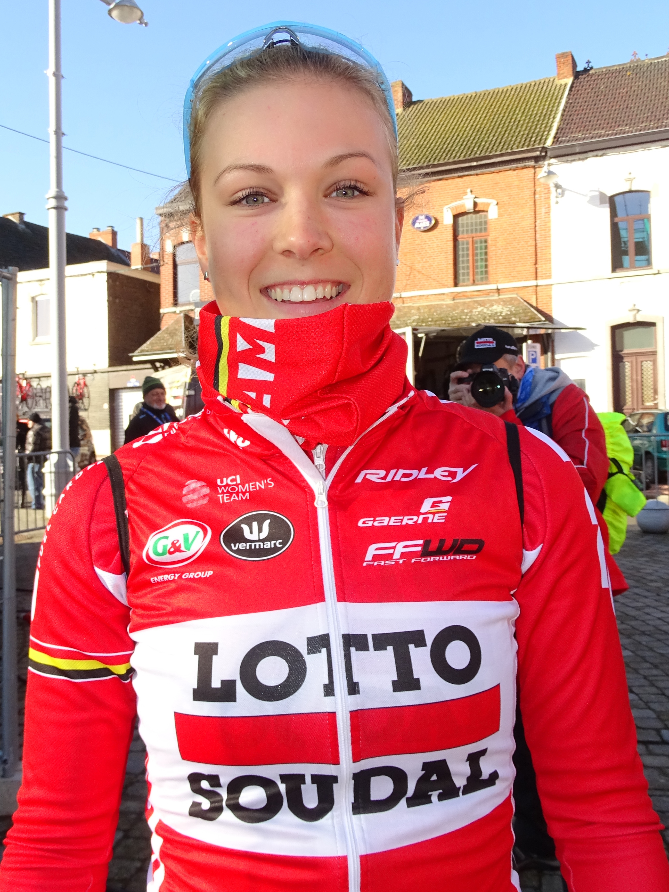 Reportage réalisé le mercredi 2 mars à l'occasion du départ du Samyn des Dames 2016 et du Samyn 2016 à Quaregnon, Belgique.